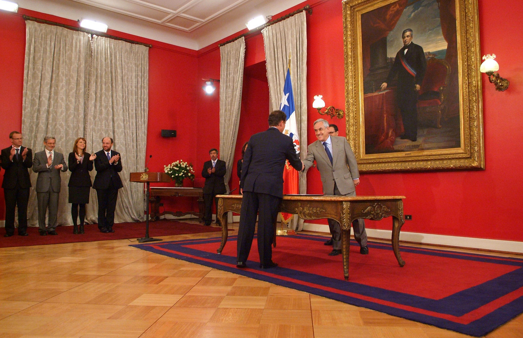 Chile, Palacio de La Moneda. Juramento del Nuevo Ministro de Vivienda y Urbanismo, Rodrigo Pérez Mackenna.